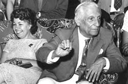 Foto do Professor Henrique José de Souza